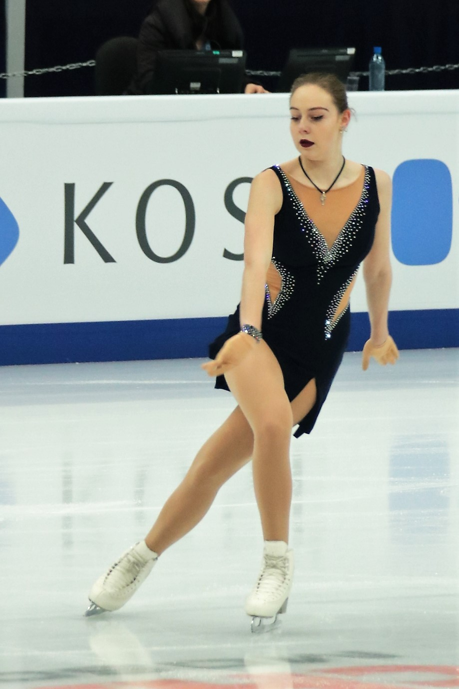 Эльжбета Кропа (Литва) на Чемпионате Европы по фигурному катанию 2018.